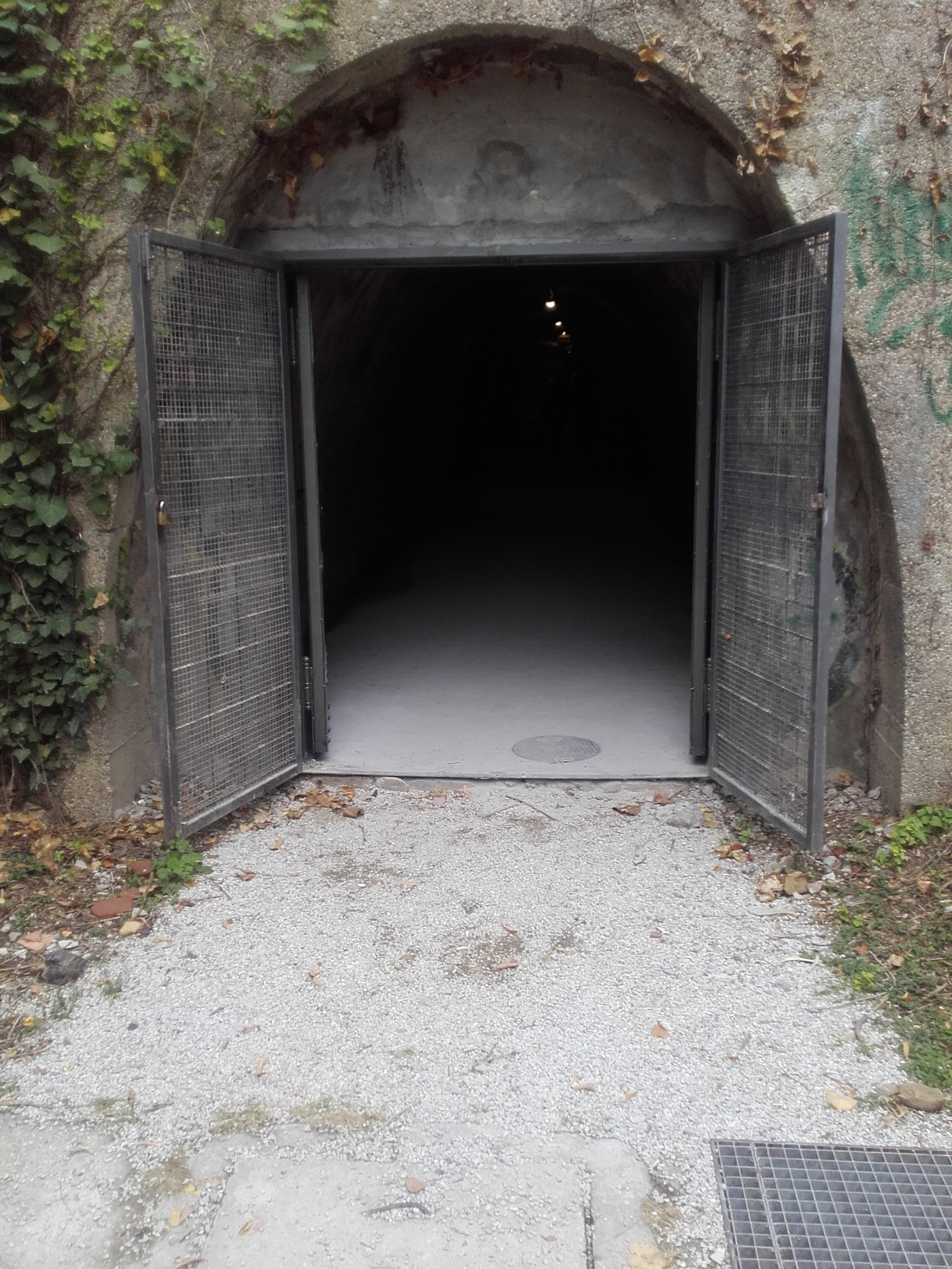 Ulaz u Tunel Grič iz parka u Tomićevoj ulici